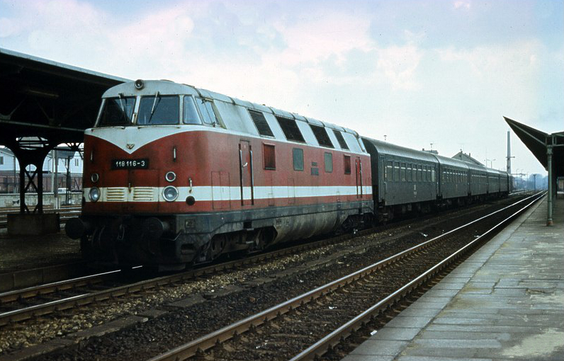 118 116 des BW Bautzen mit Personenzug auf der Fahrt von Dresden nach Görlitz beim Halt in Bischofswerda